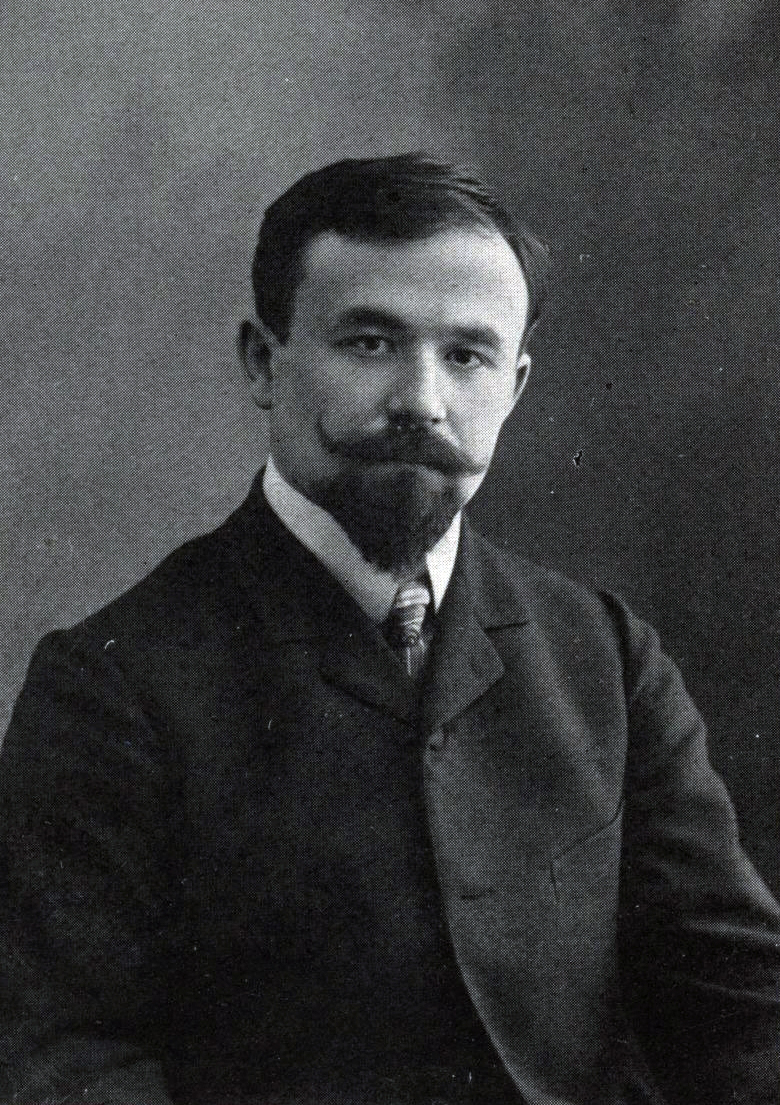 Шкляр, Николай Григорьевич